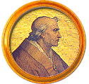 Médaillon de la frise des papes à Saint-Paul-hors-les-Murs. Il s'agit d'une mosaïque représentant Serge III, 119e pape de l'Église catholique (903-911). Il fait parie de la série de médaillons voulue par Grégoire XVI destinée à remplacer ceux de l'ancienne basilique après l'incendie de 1823.